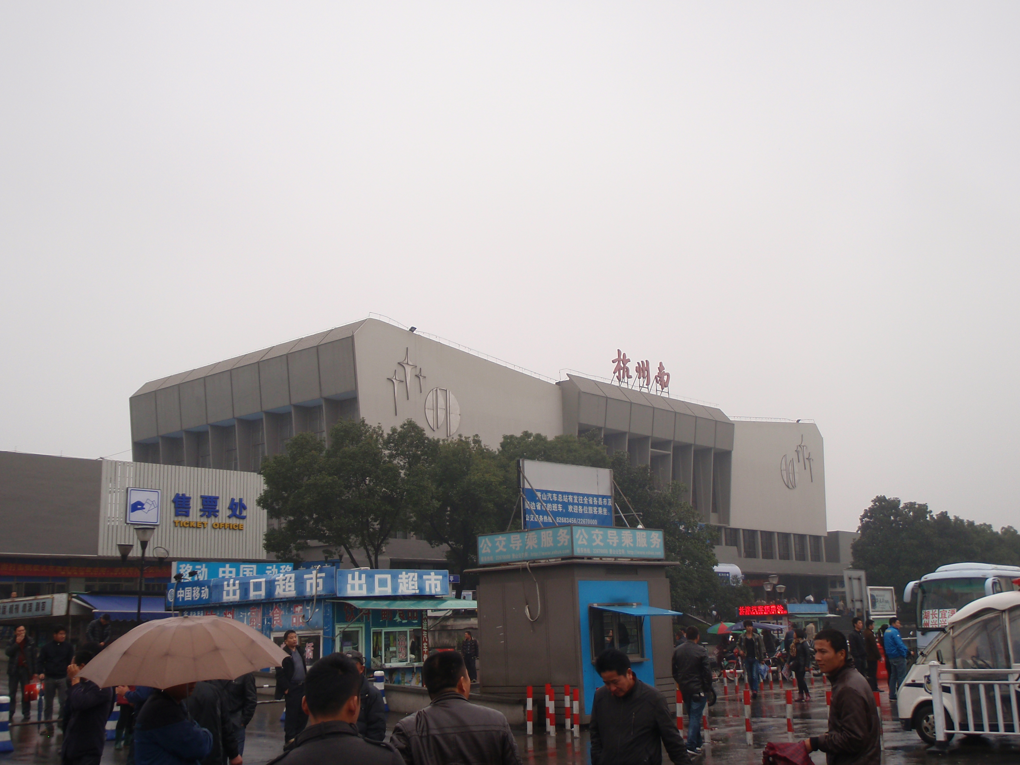 杭州火车南站